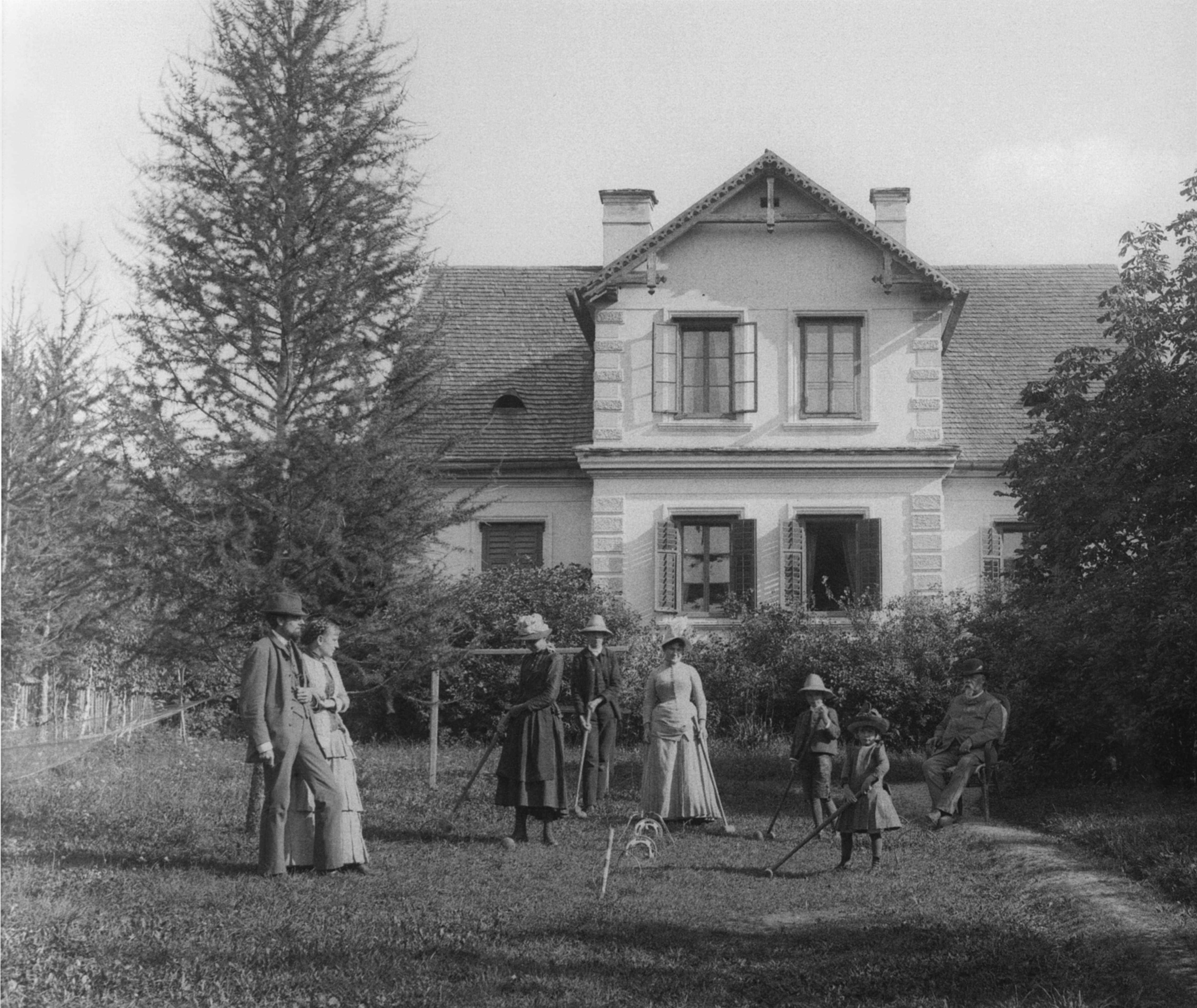 Croquet-Spieler vor der Roseggervilla in Krieglach